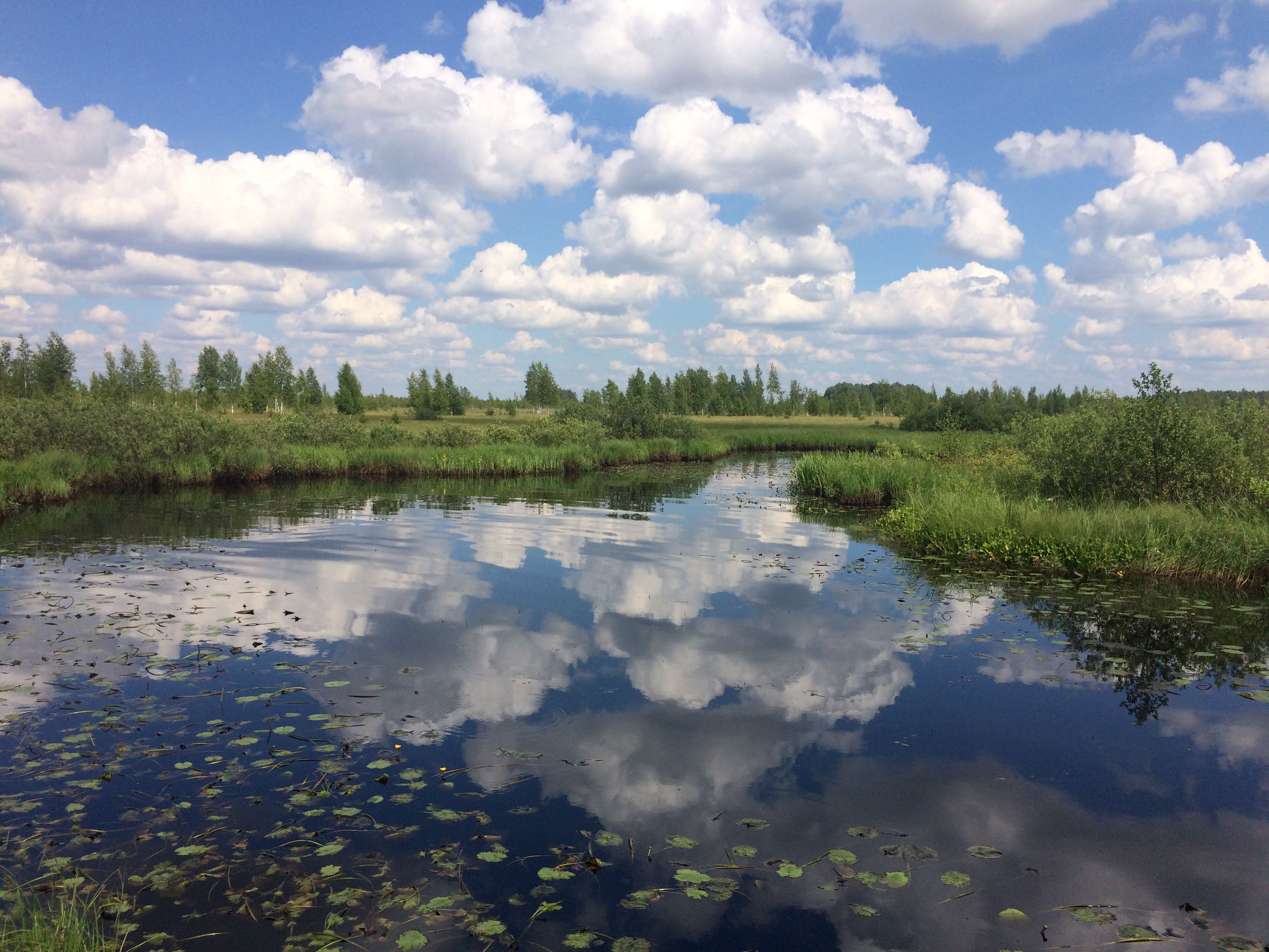 Полистовский заповедник, июль 2016